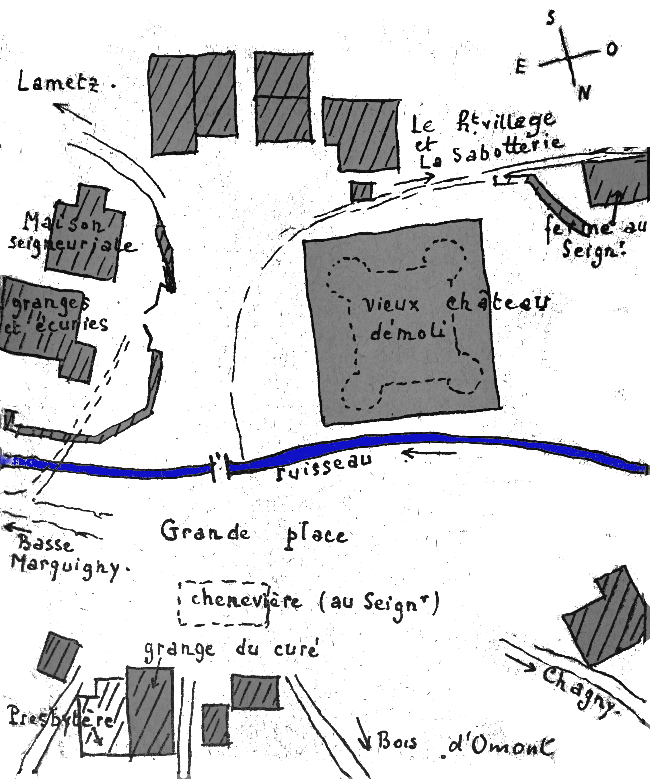 issu de l'almanach matot-braine. Carte de 1766.